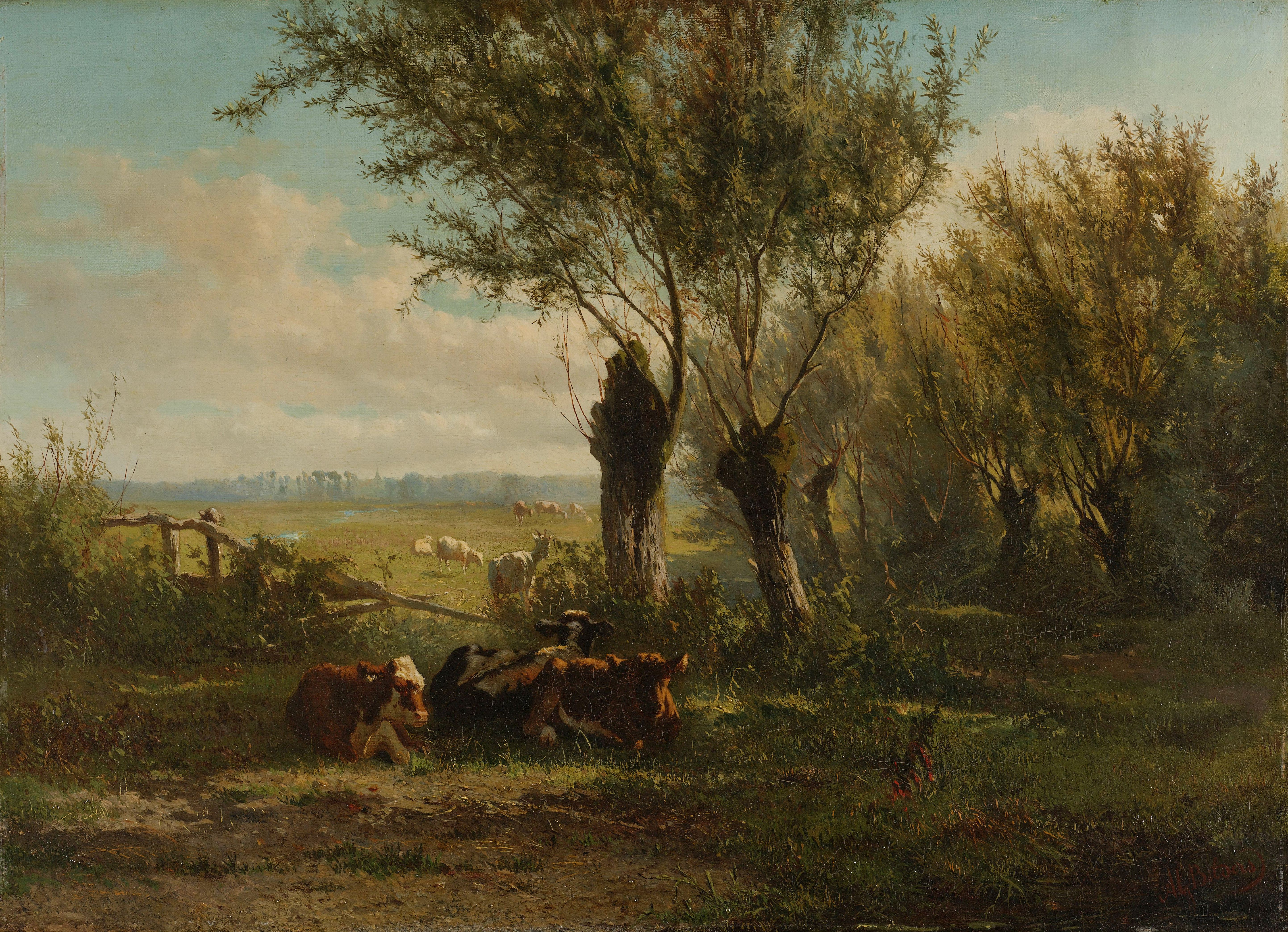 Weiland bij Oosterbeek. Op de voorgrond in de schaduw van een paar wilgen liggen drie koeien.; Albert Gerard Bilders (1838–1865), olieverf op doek, 1860